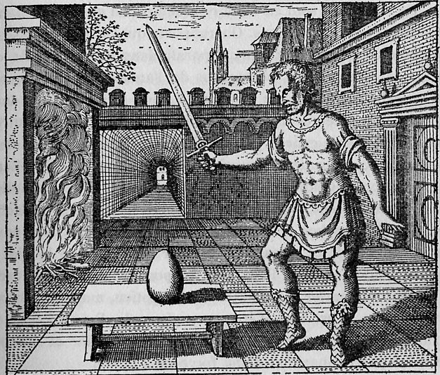 Emblem 8